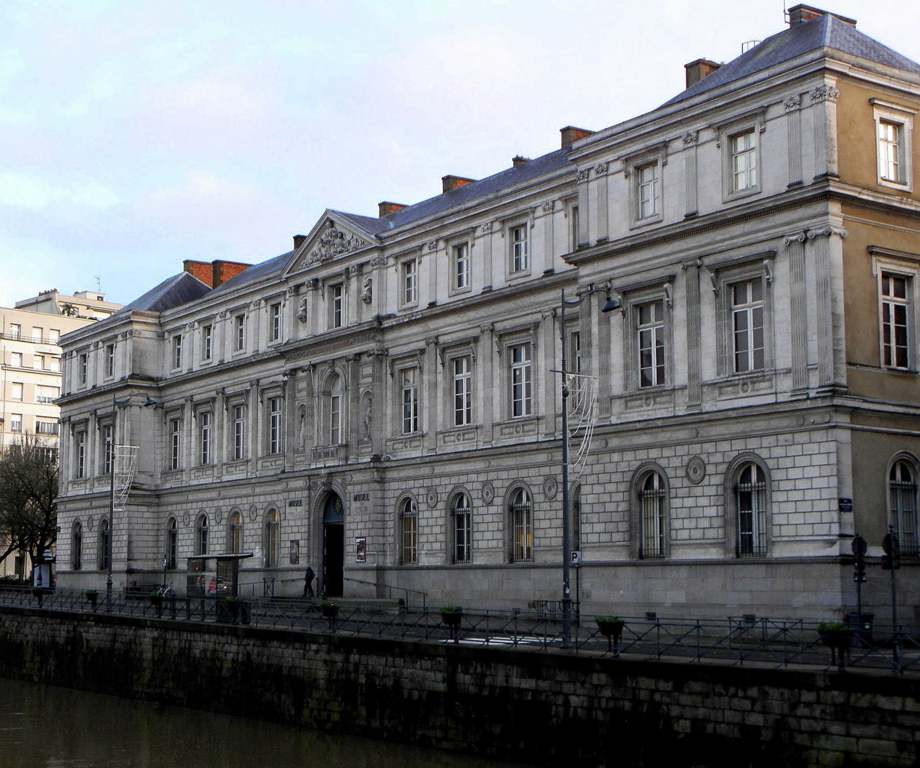 Ancien Palais universitaire de Rennes (35), actuel Musée des Beaux-Arts de Rennes. Façade nord.